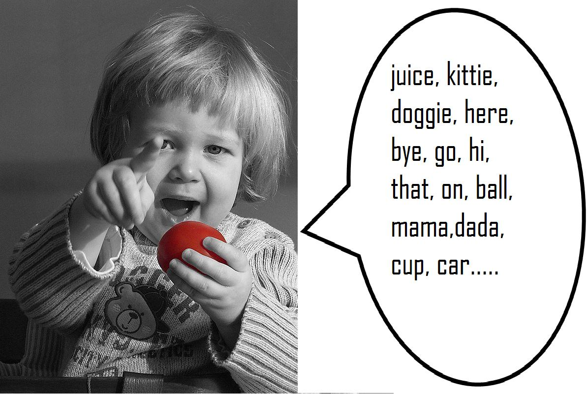 Freistellung, einer Tomate in den Händen eines Kleinkindes (16 mon.)